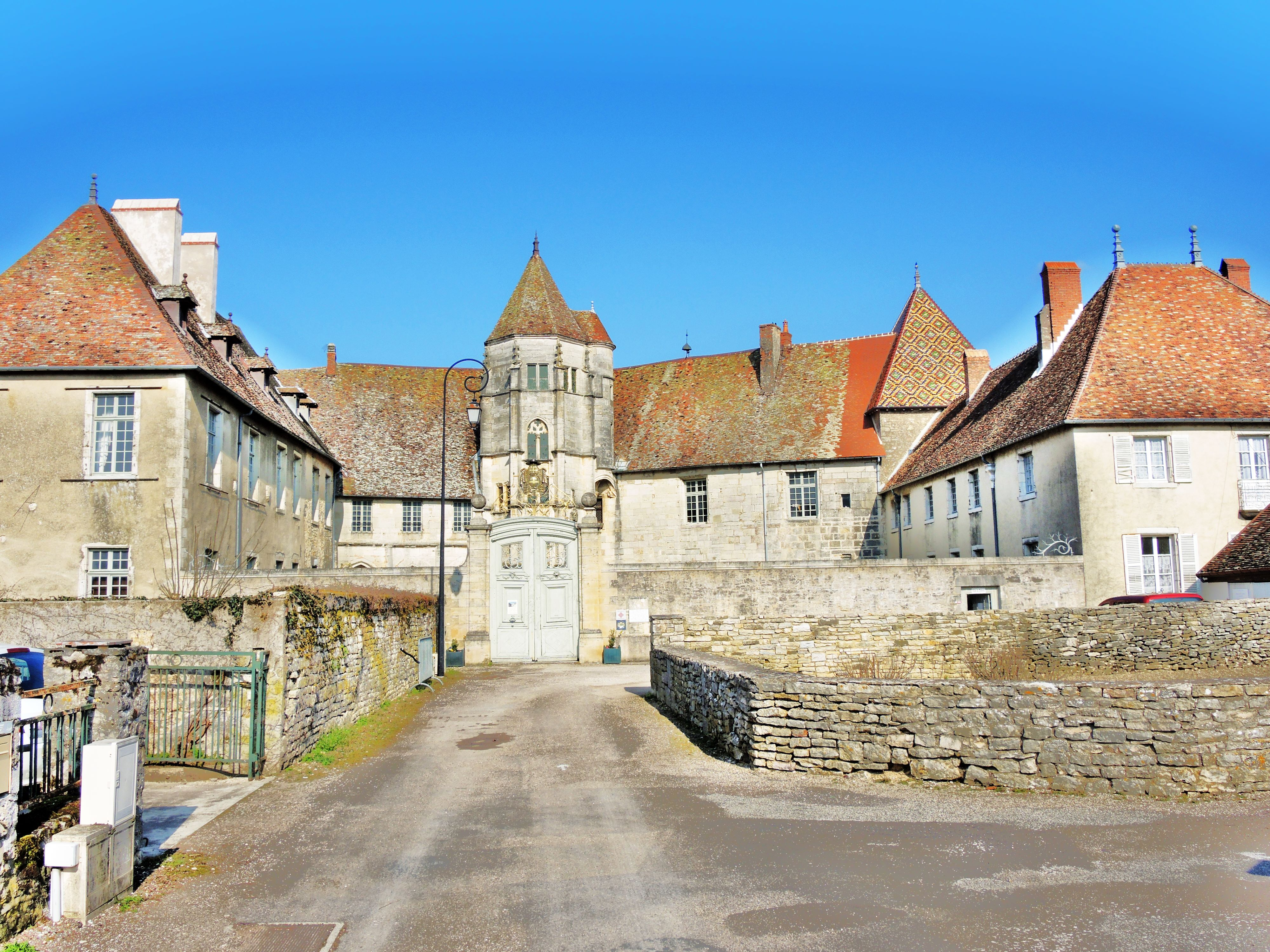 Façade du château, vue de la route d'accès.